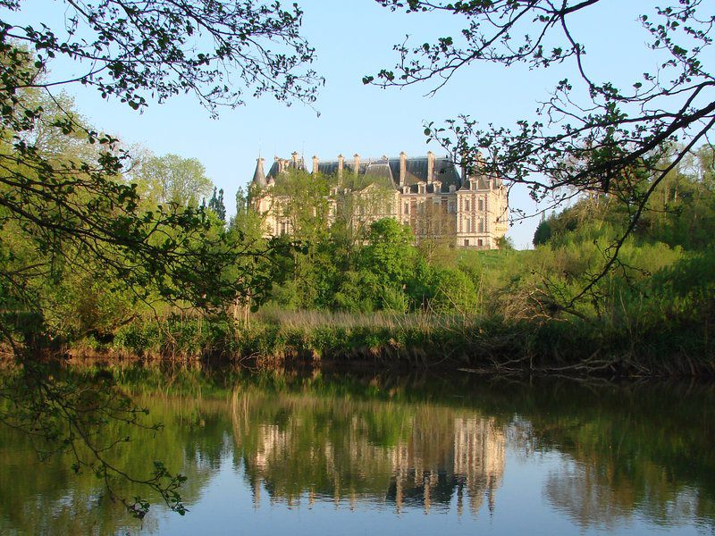 Façade Nord, vue depuis la rivière l'Ognon